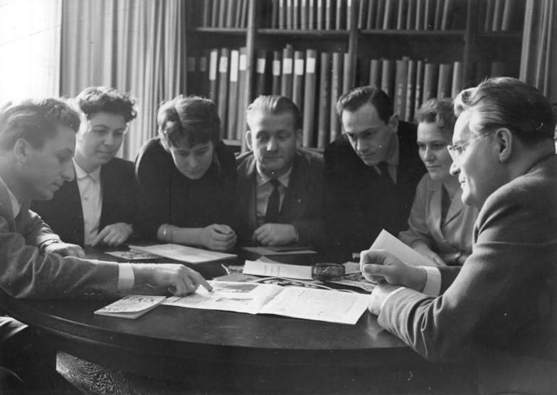 Zentralbild Ulmer 6.11.1958 - Ein Tag bei dem Spitzenkandidaten Gerald Götting Der Spitzenkandidat für den Wahlkreis Halle, Gerald Götting, Generalsekretär der Christlich-Demokratischen Union und Stellvertreter des Präsidenten der Volkskammer der DDR, hat es besonders in der Vorbereitung der Volkswahlen nicht sehr einfach. Die Ausübung der einzelnen Funktionen allein verlangen angestrengte Arbeit. Außerdem ist er täglich unterwegs, um sich seinen Wählern als Kandidat für die Volkskammer vorzustellen. UBz: Im Gespräch mit Mitarbeitern des Parteivorstandes der CDU über das bisherige Ergebnis der Wahlagitation im Hause. Gerald Götting (rechts außen).